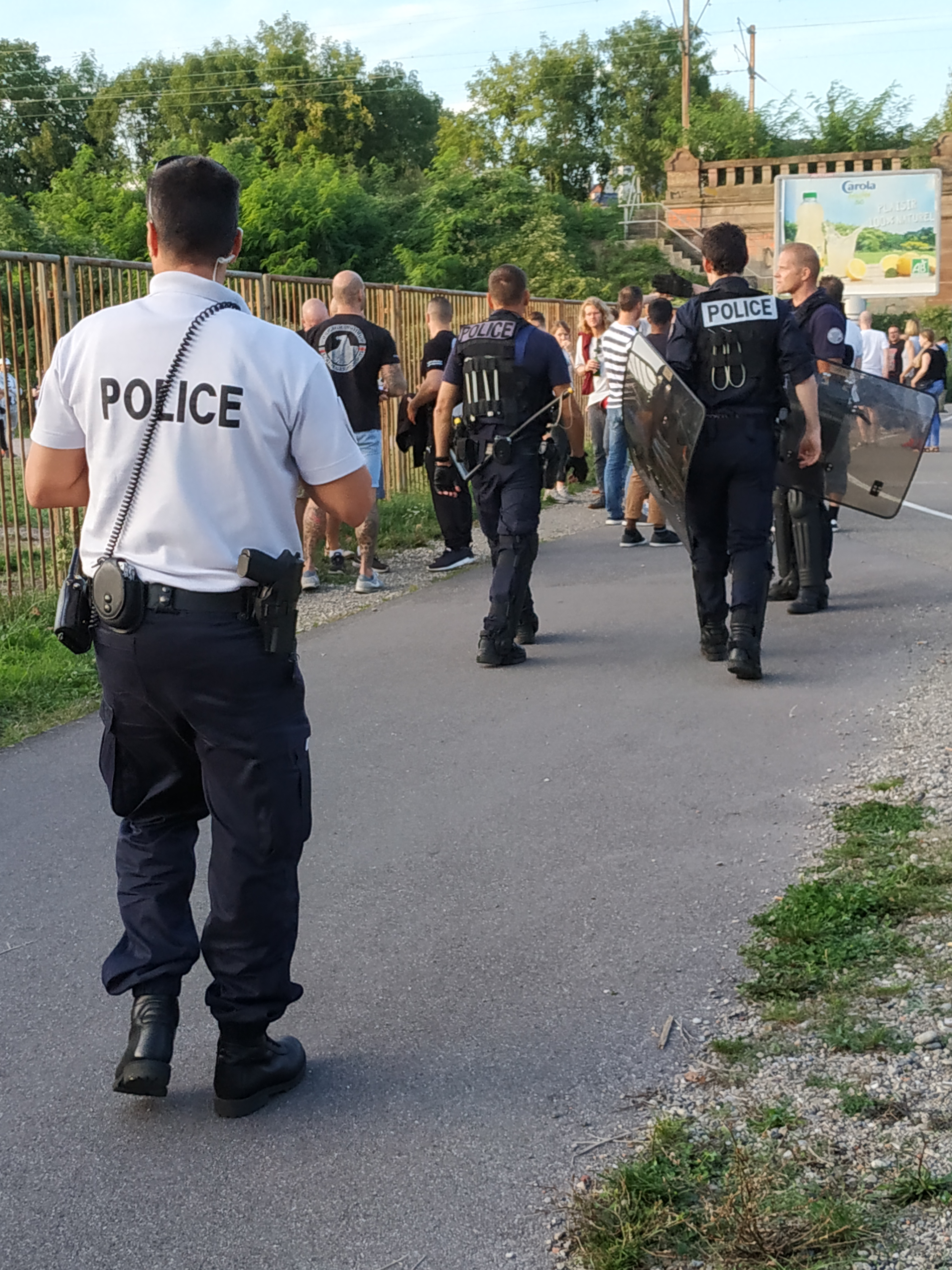 Policiers nationaux contrôlant les supporters aux abords du Stade de la Meinau, lors du match Racing-Eintracht Francfort à Strasbourg (22 août 2019)